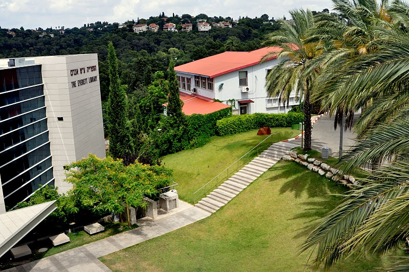 מבט על -איזור הספרייה האקדמית ומתחם האמנות